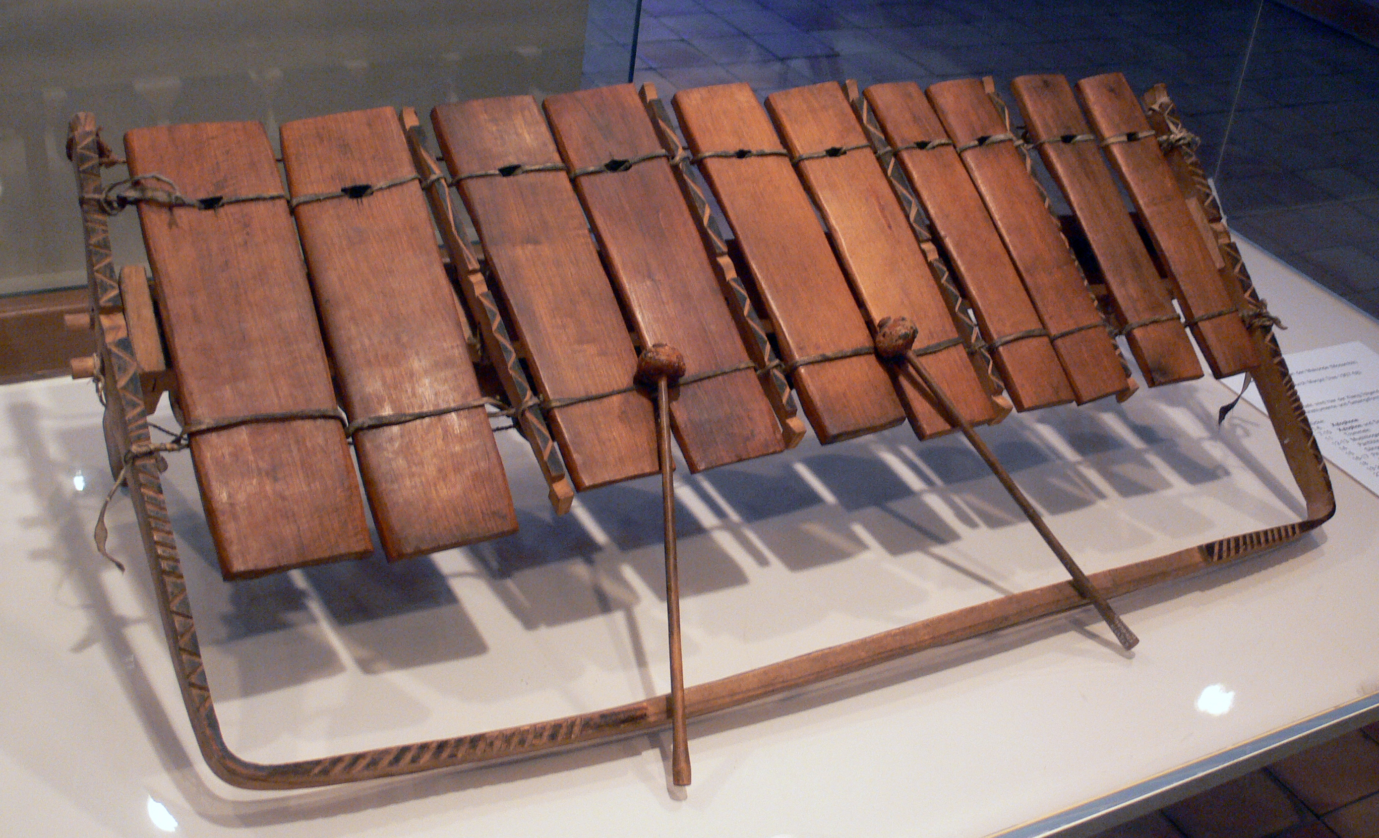 Stuttgart, Linden-Museum Xylophon und zwei Schlegel aus Mosambik, Inv. Nr. F 54559a-c